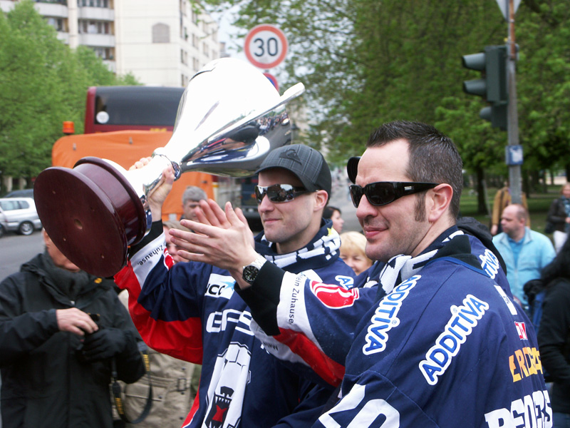 Meisterfeier der Eisbären Berlin 2009